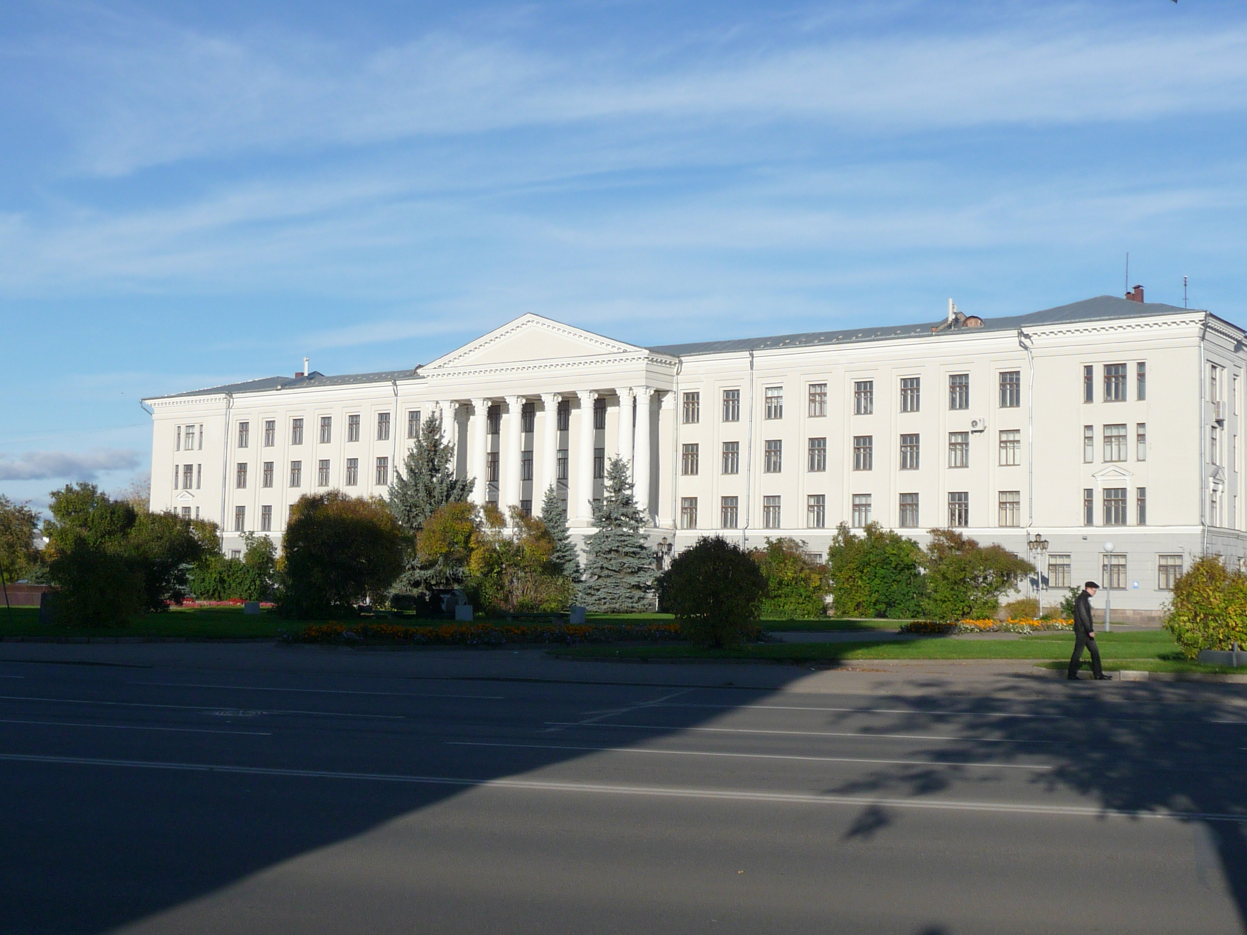 Здание Педагогического университета им. С. М. Кирова